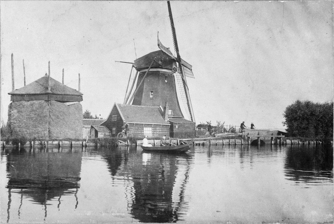 Stammermolen: Grondzeiler aan de Gaasp schuin van opzij gefotografeerd